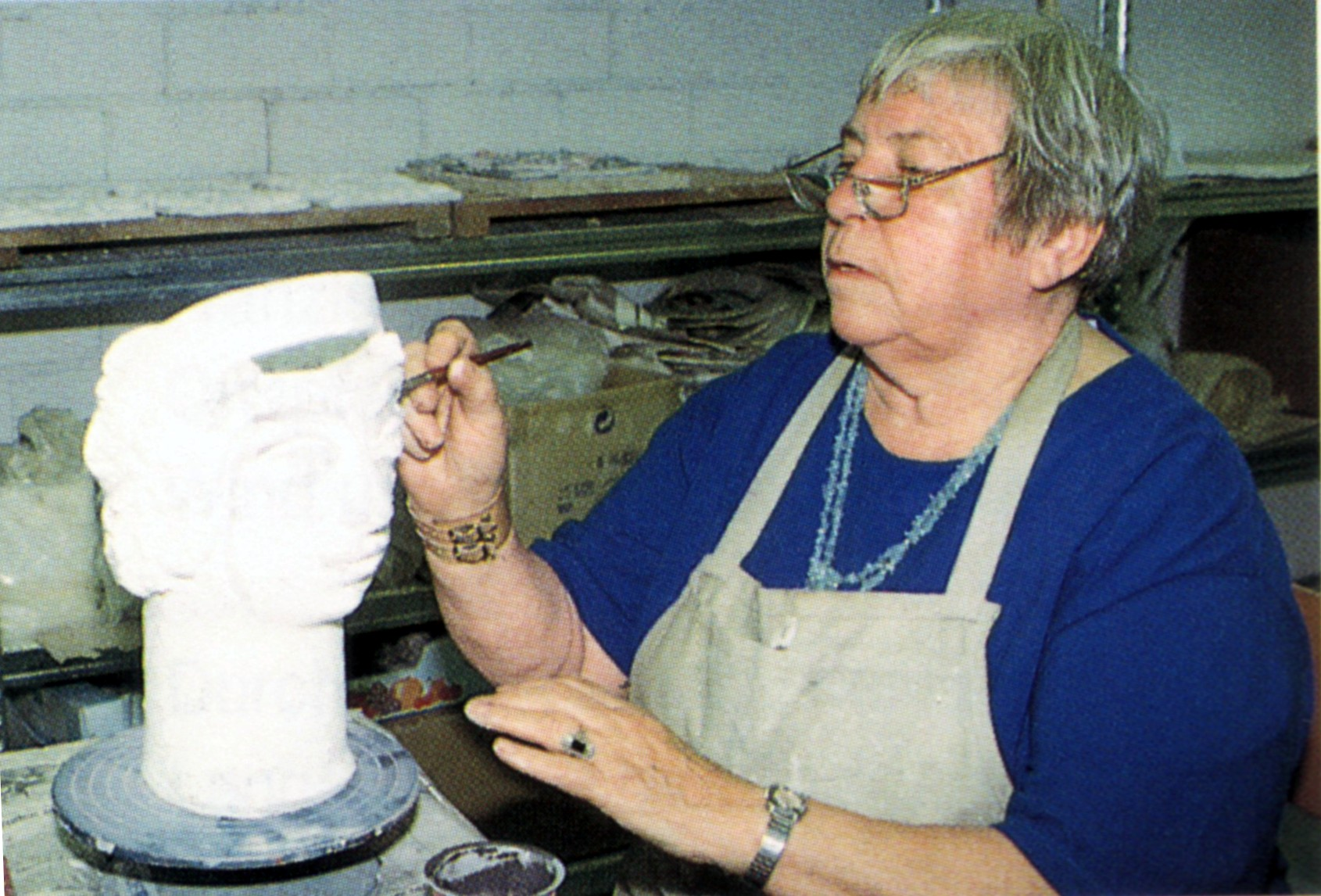 Anneliese Langenbach in Werkstatt